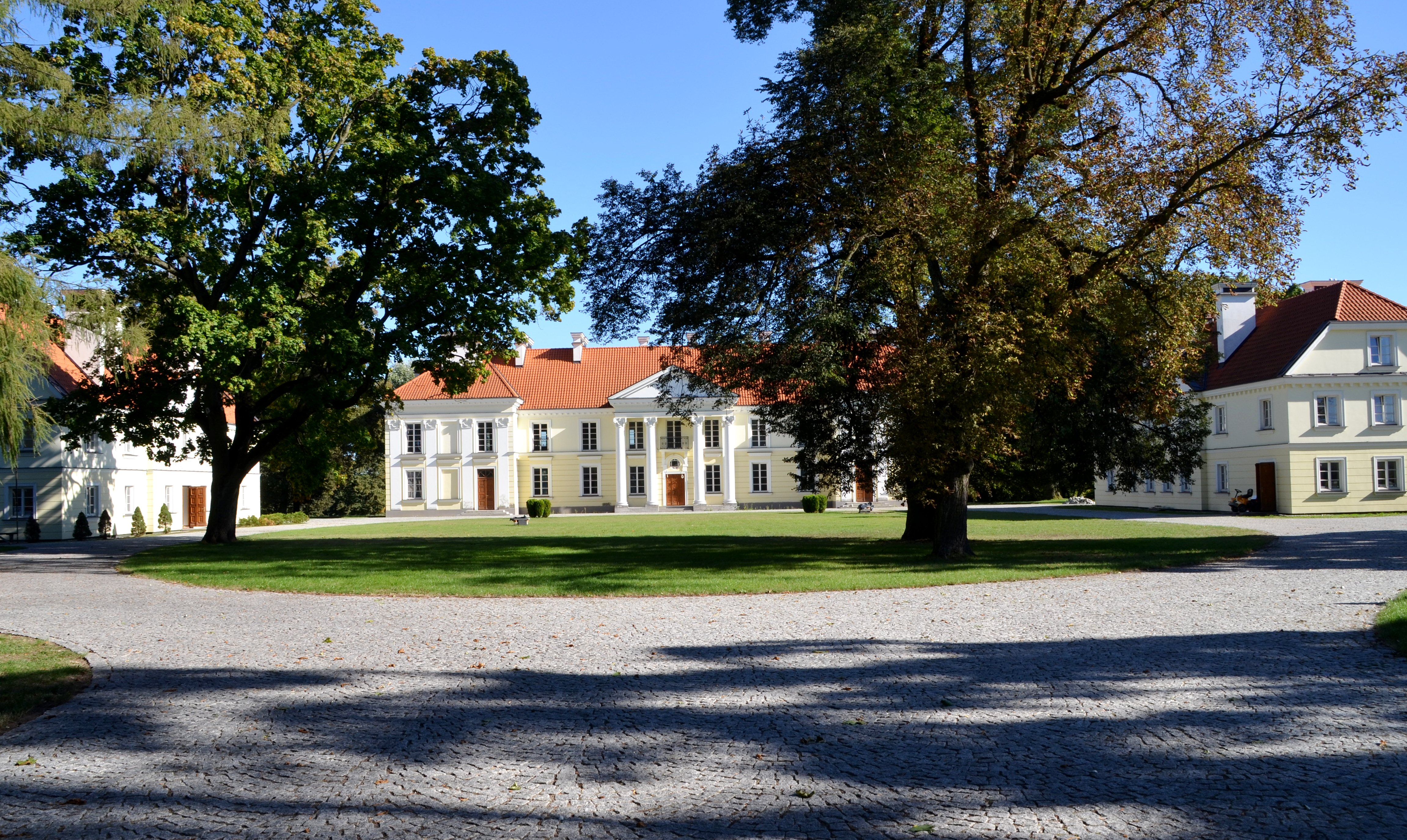 Wyszków, zespół pałacowy, XVIII, XIX